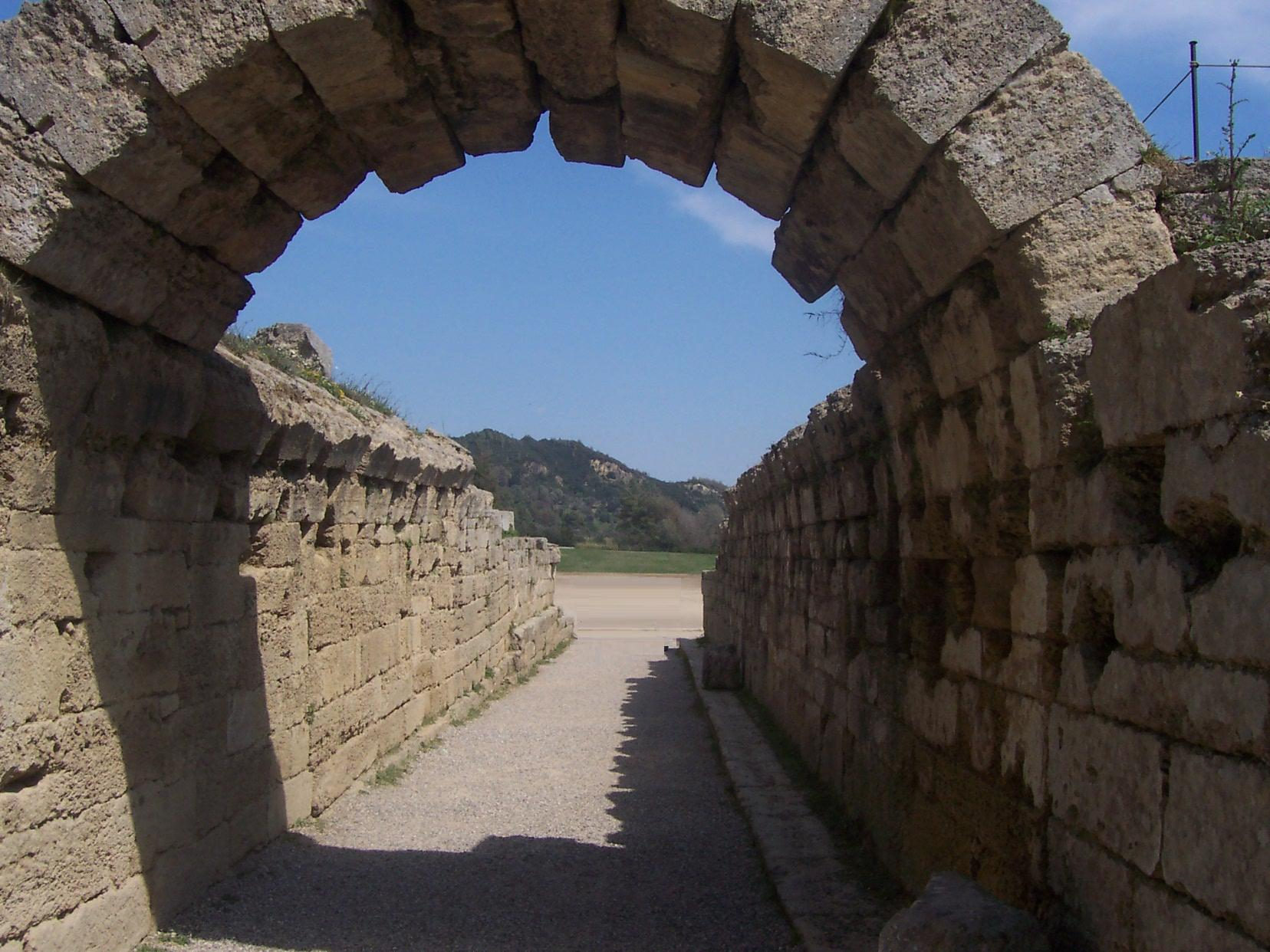 foto Sofie Debognies april 2005